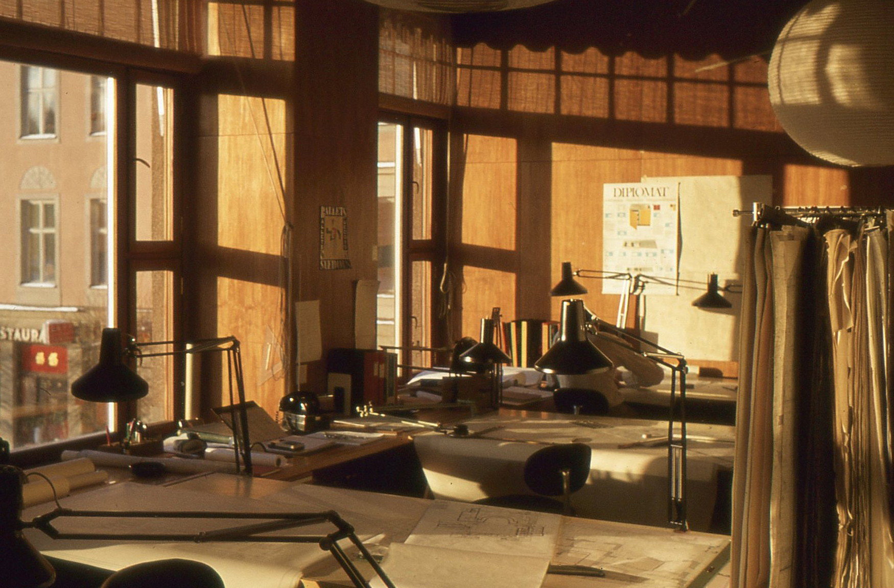 "Modehuset 66" Kornhamnstorg 49/Västerlånggatan 66, Bengt Holger Jonsons arkitektkontor våning 1 tr.